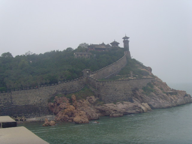 Penglai, Shandong, China